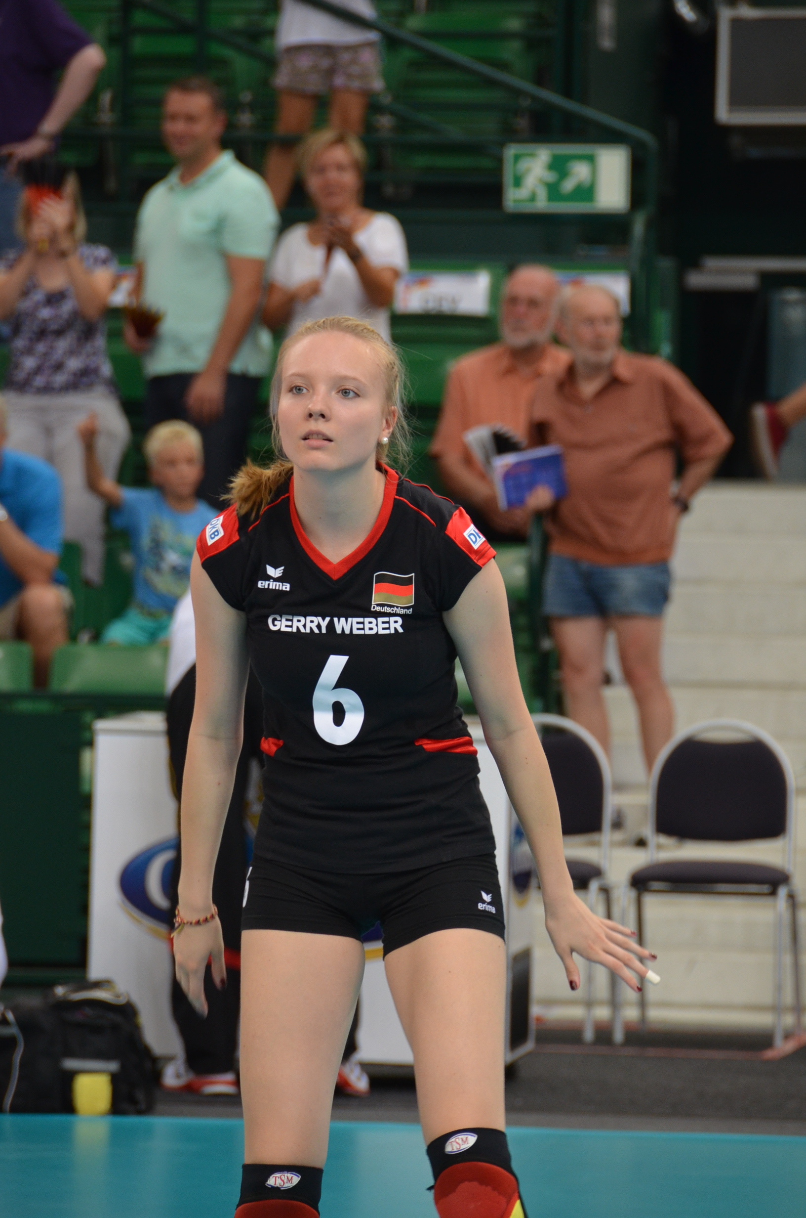 Volleyball-Europameisterschaft der Frauen 2013-Spielort Halle (Westf) Gerry-Weber-Stadion - Spiel 6. September 2013 (Deutschland-Spanien)